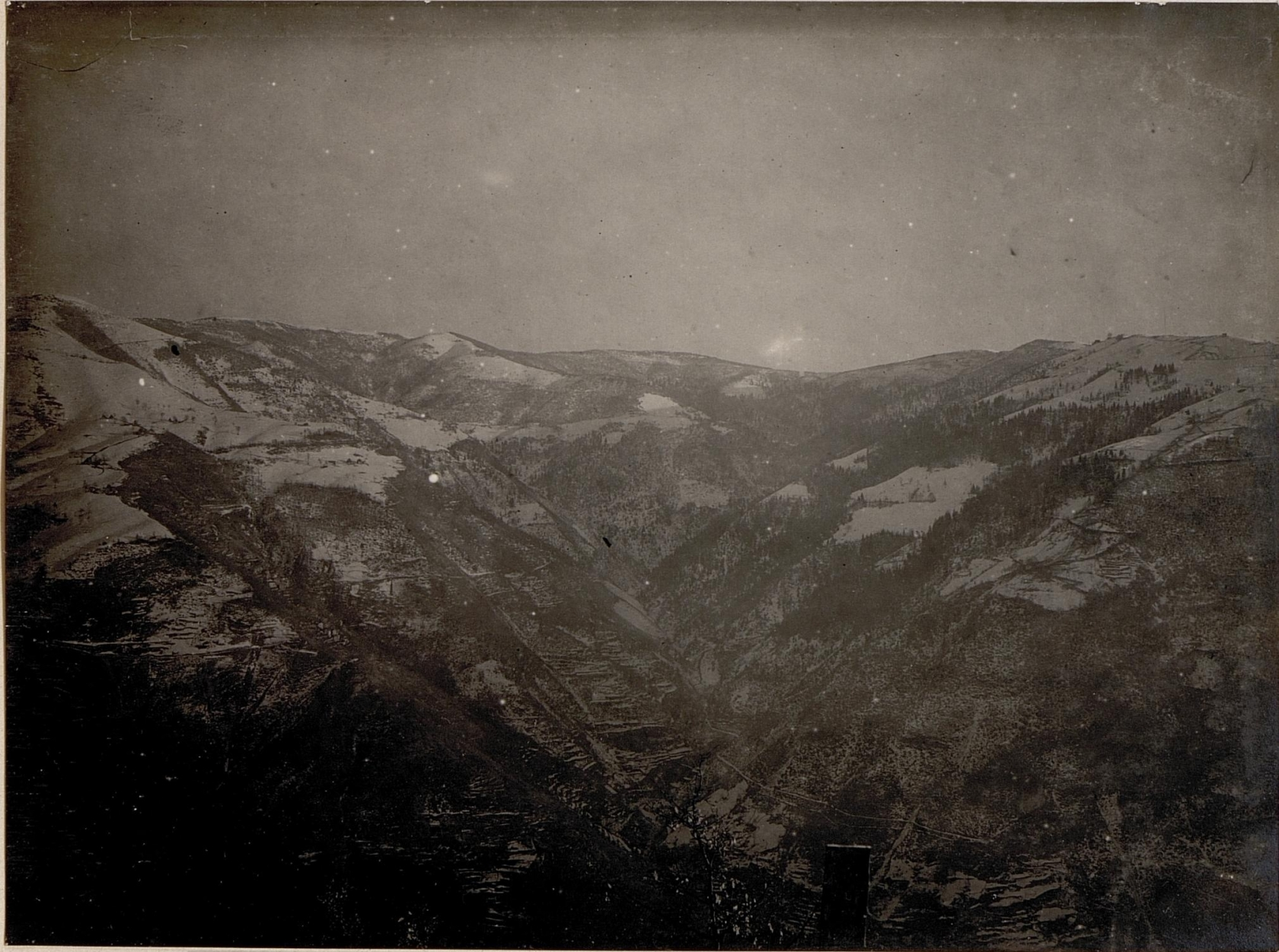 Panorama: Col del Rosso. Standpunkt Monte Spiel. (2 Teilbild zu WK1_ALB084_24417a)